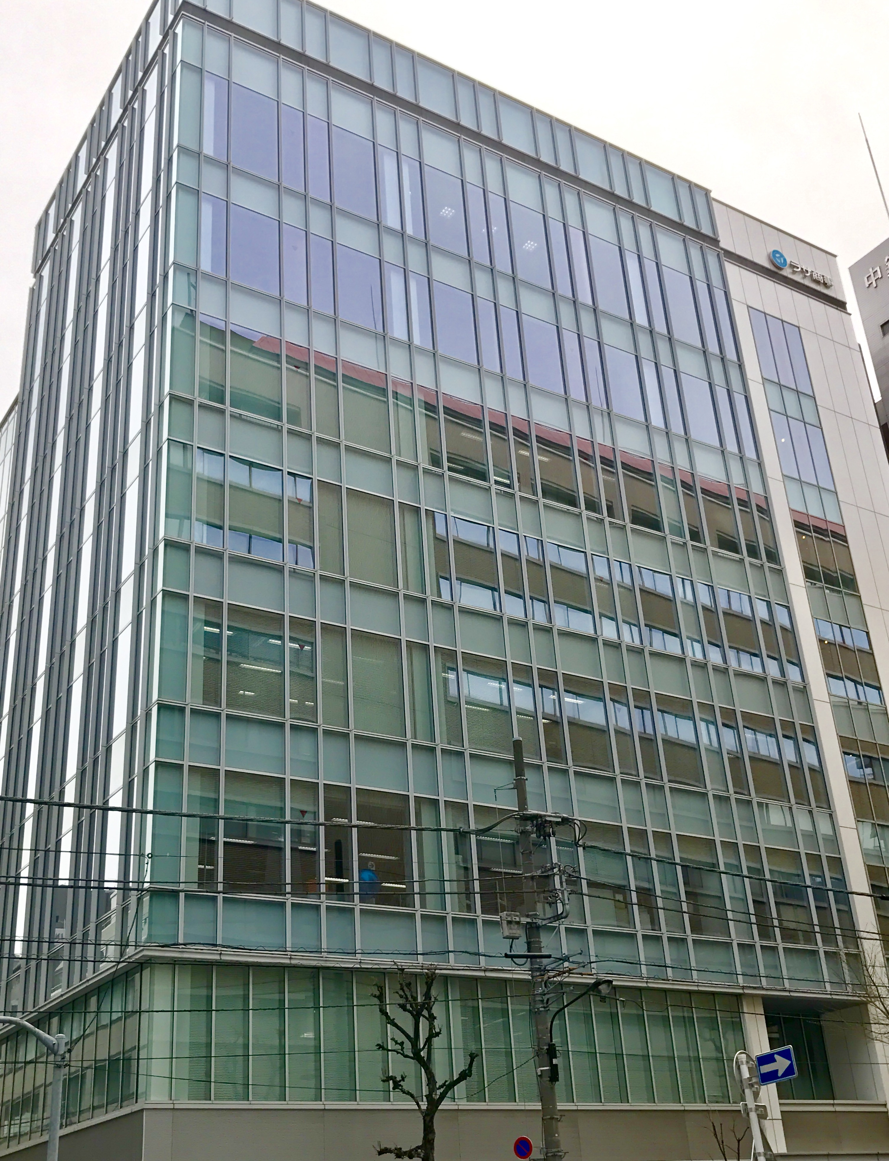 本社が入居するRASA日本橋ビルディング